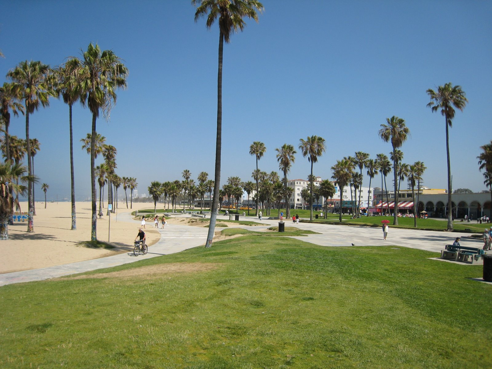 Le Boardwalk — Venice County Beach.